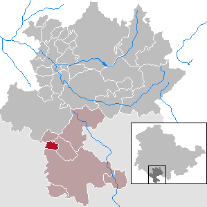 Schlechtsart in Thuringia - district Hildburghausen